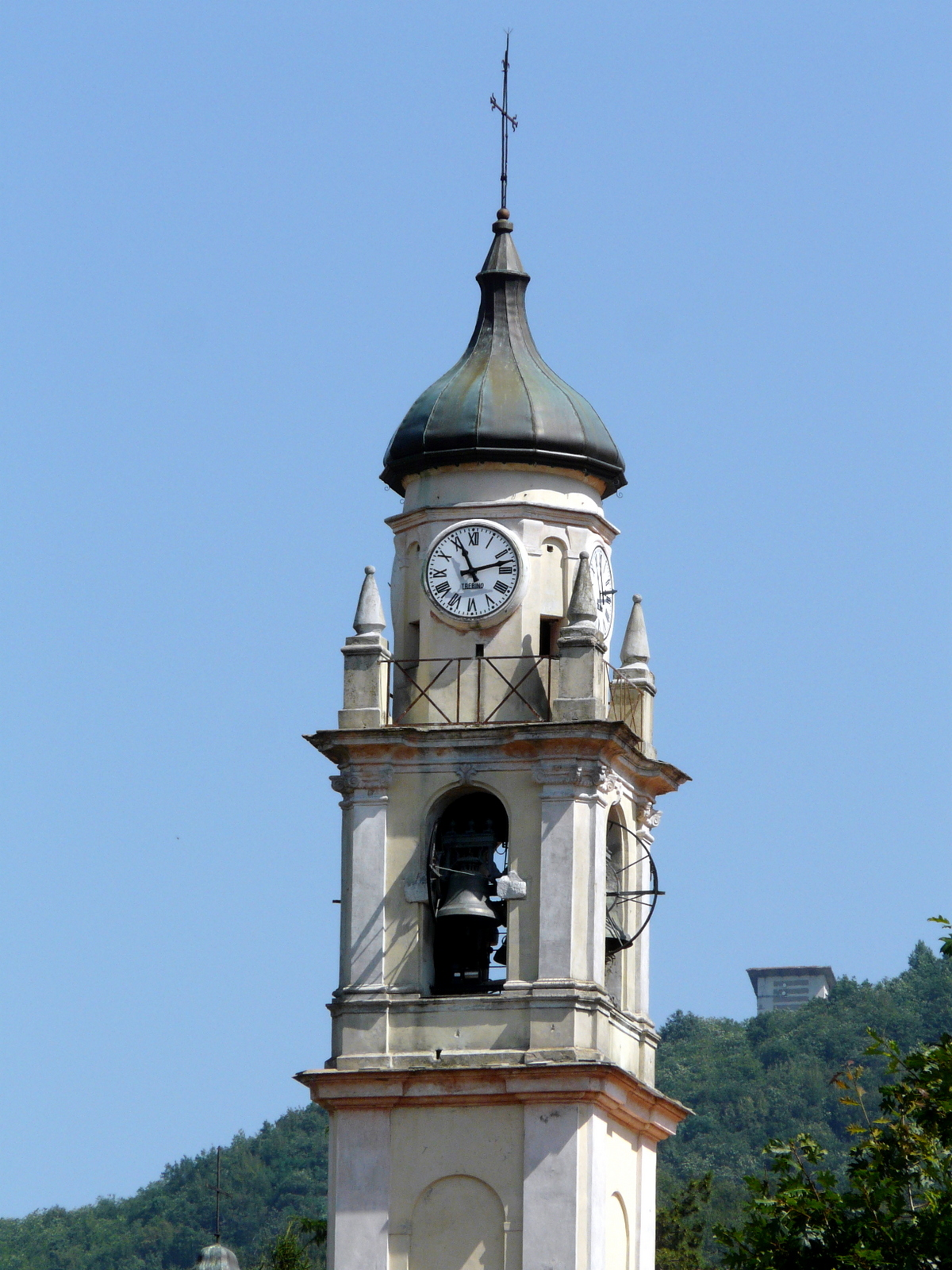 Il campanile della chiesa di Santo Stefano, Casella, Liguria, Italia